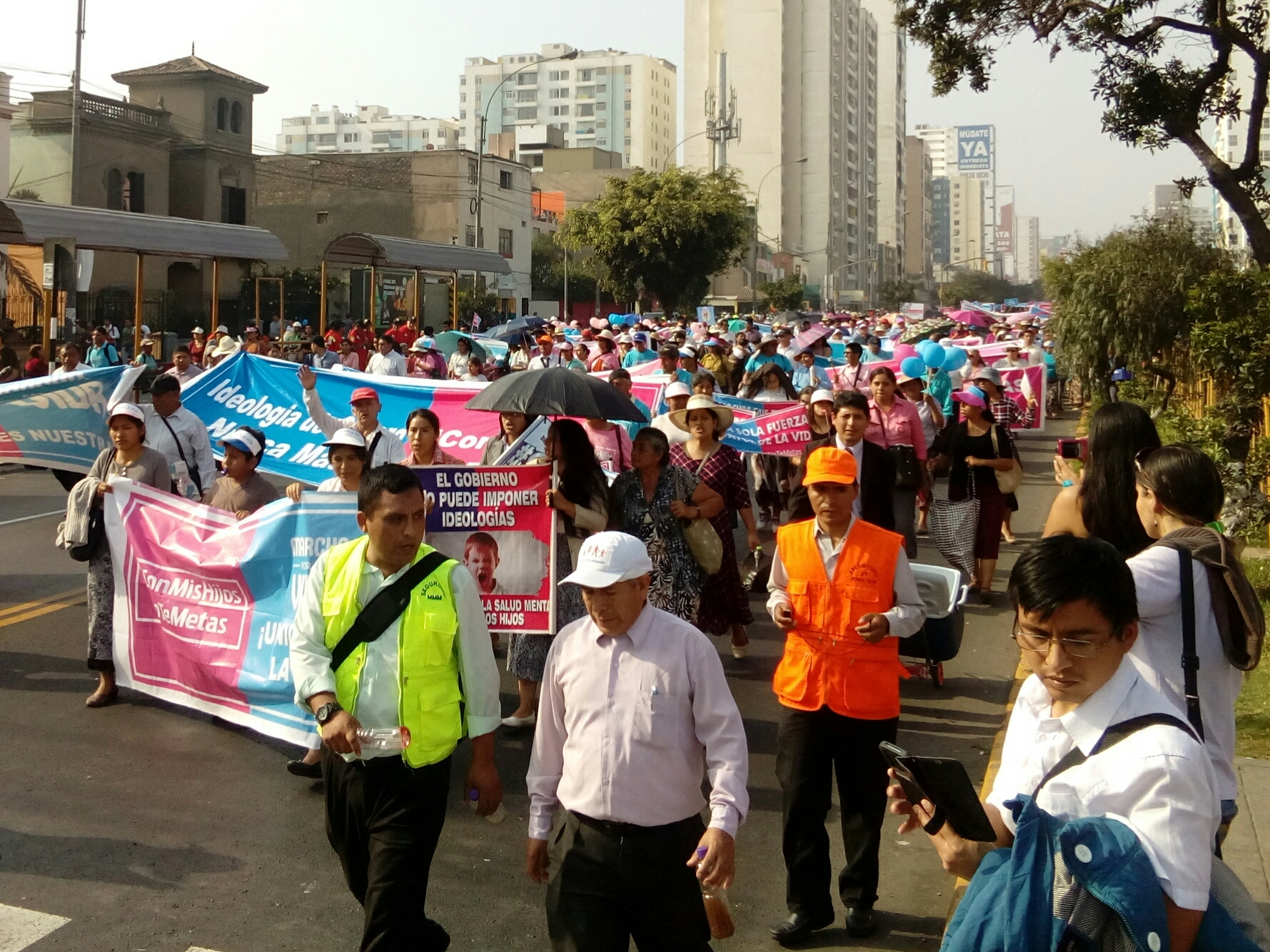 Imagen recortada de varios manifestantes limeños (la mayoría del movimiento conservador Con mis Hijos no te Metas) protestando contra el aborto en la Marcha por la Vida de 2018, Perú. Notase que hay mas de uno sosteniendo carteles en contra de la "ideología de género".